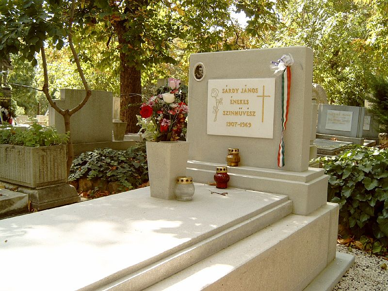 Sárdy János (Nagykónyi, 1907. július 27. – Budapest, 1969. március 9.) magyar operaénekes sírja Budapesten. Farkasréti temető: 25/1-1-45.